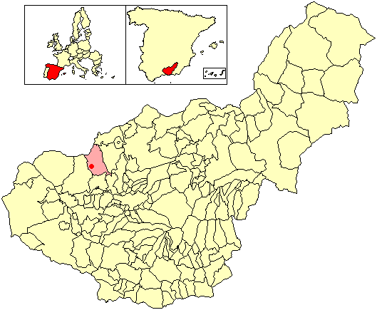 Situación de la localidad de Puerto Lope (en el municipio de Moclín) respecto a la provincia de Granada, en España.